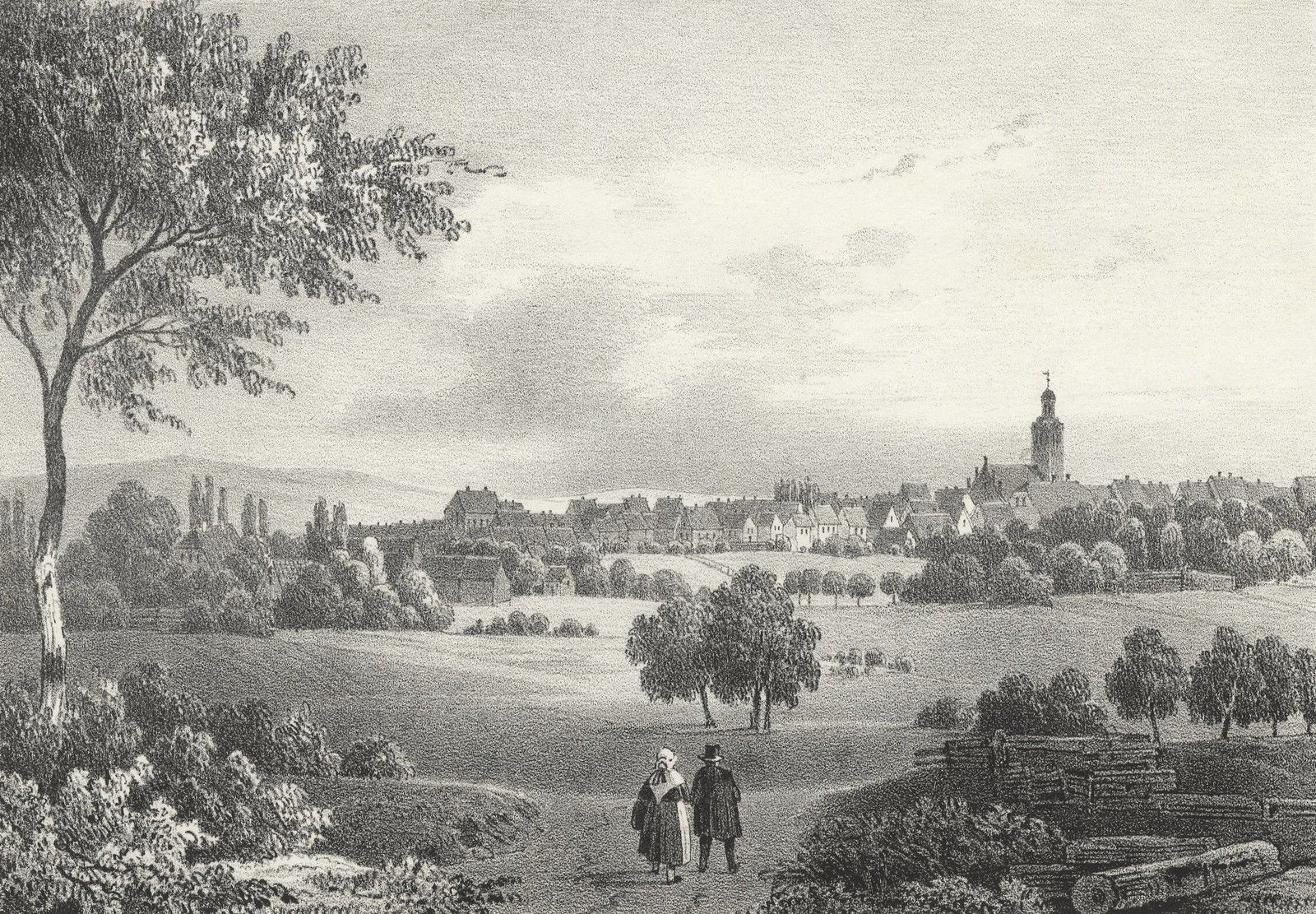 Zachan, Historische Ortsansicht. Lithographie, 1846. 13,2 x 18,9 cm (Darstellung) / 20,1 x 24,3 cm (Blatt), Unterhalb der Darstellung mittig betitelt, sowie mit dem Vermerk "Lith. Anst. v. E. Sanne u. Co. in Stettin" unten rechts versehen.